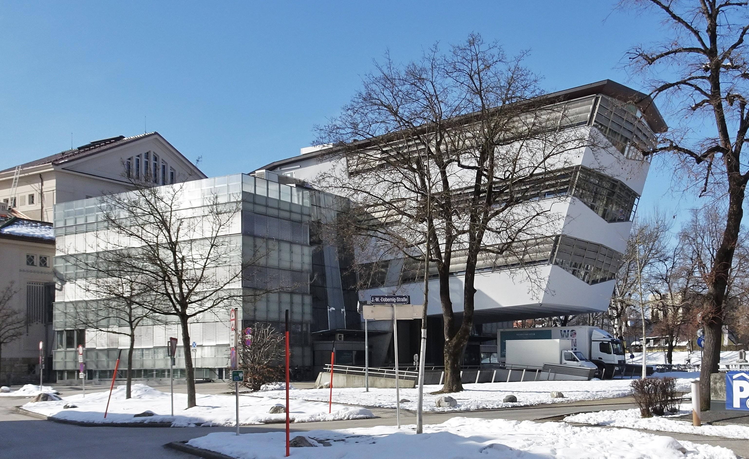 Stadttheater Klagenfurt, Zubau von Günther Domenig